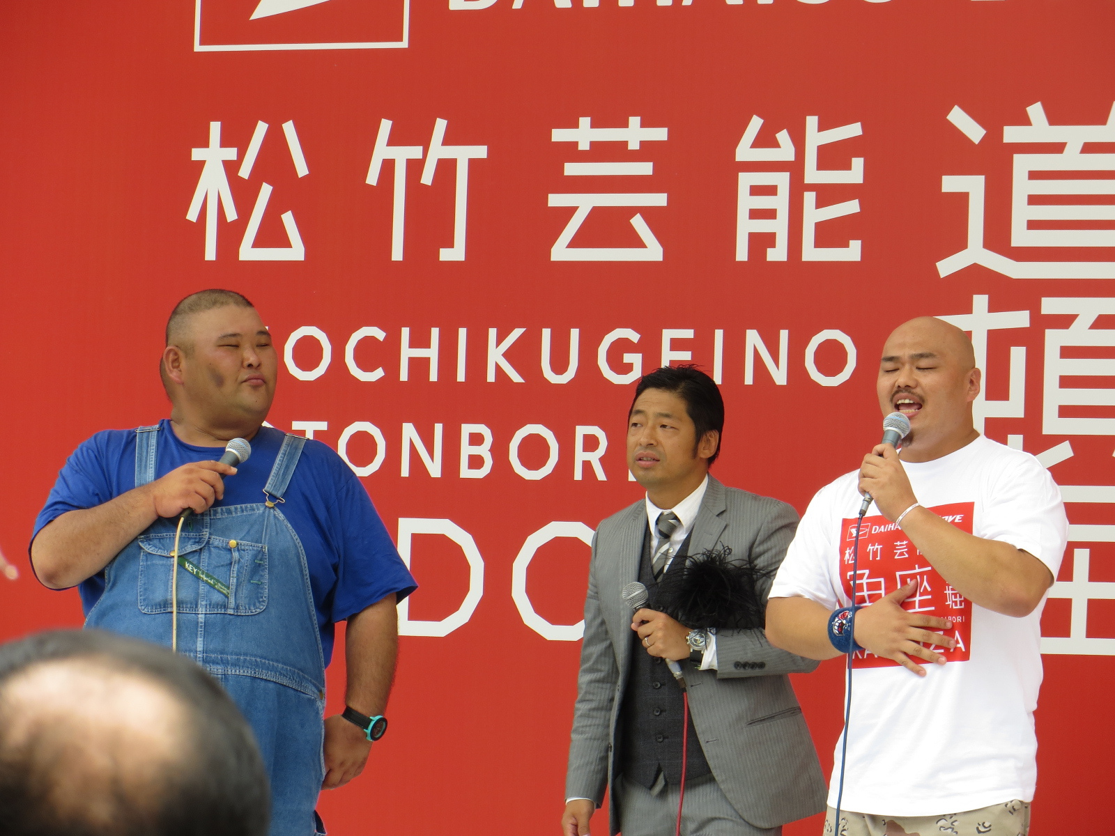 新生・道頓堀角座 安田大サーカス